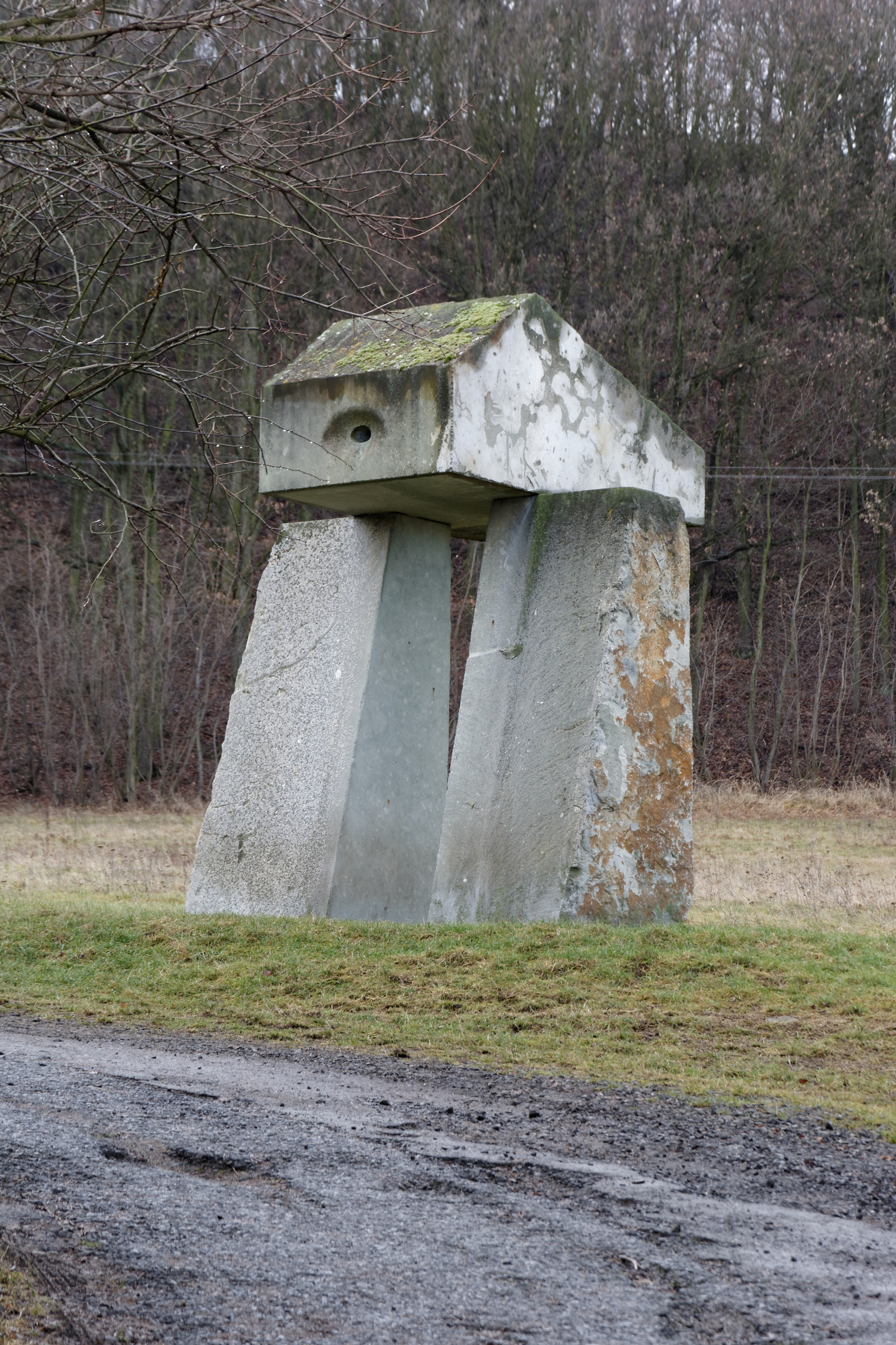 Jan Koblasa: Volání hory, 2002, Cesta přátelství, 13.